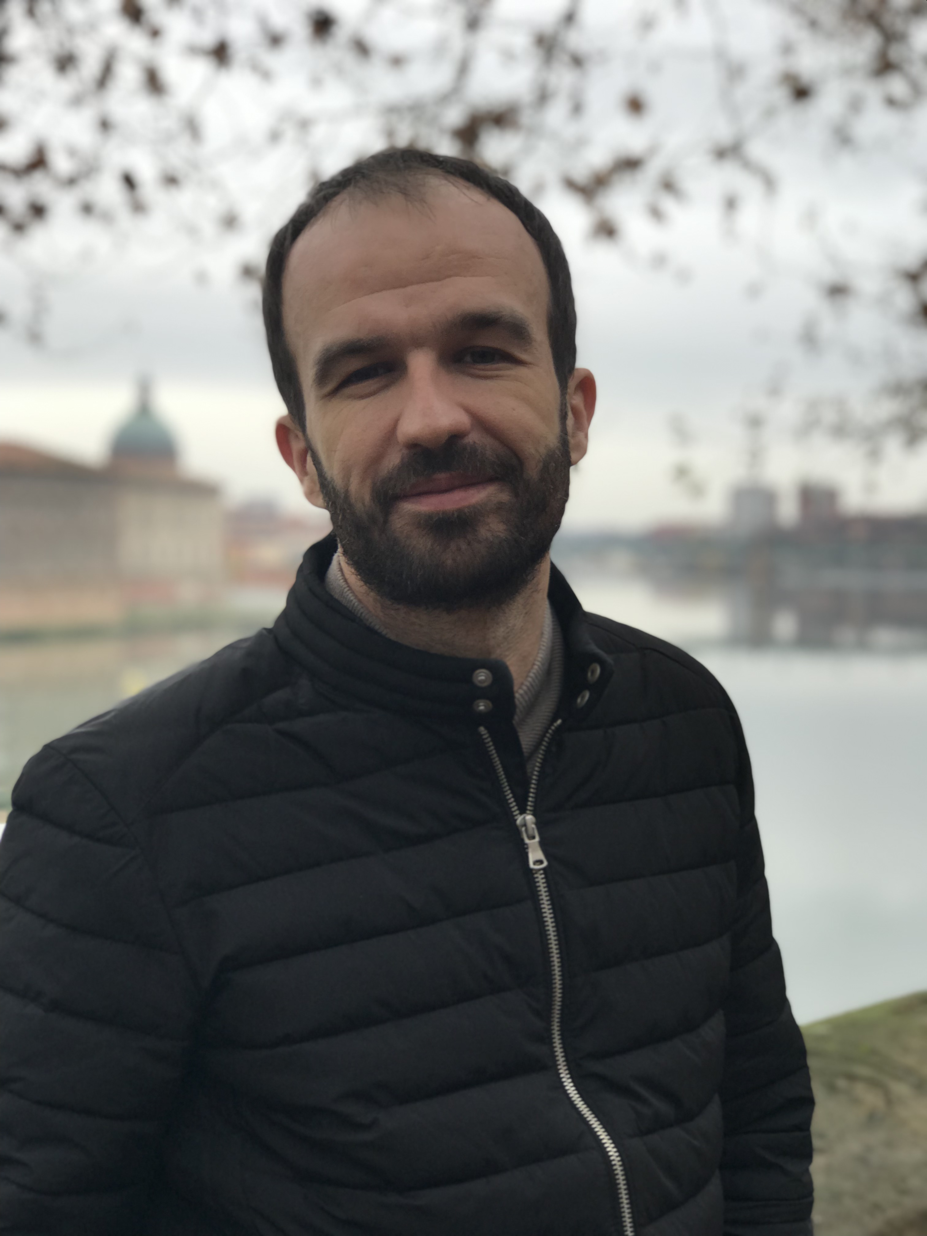 Manuel Bompard à Toulouse le 22 décembre 2018 Depicted person: Manuel Bompard – French politician